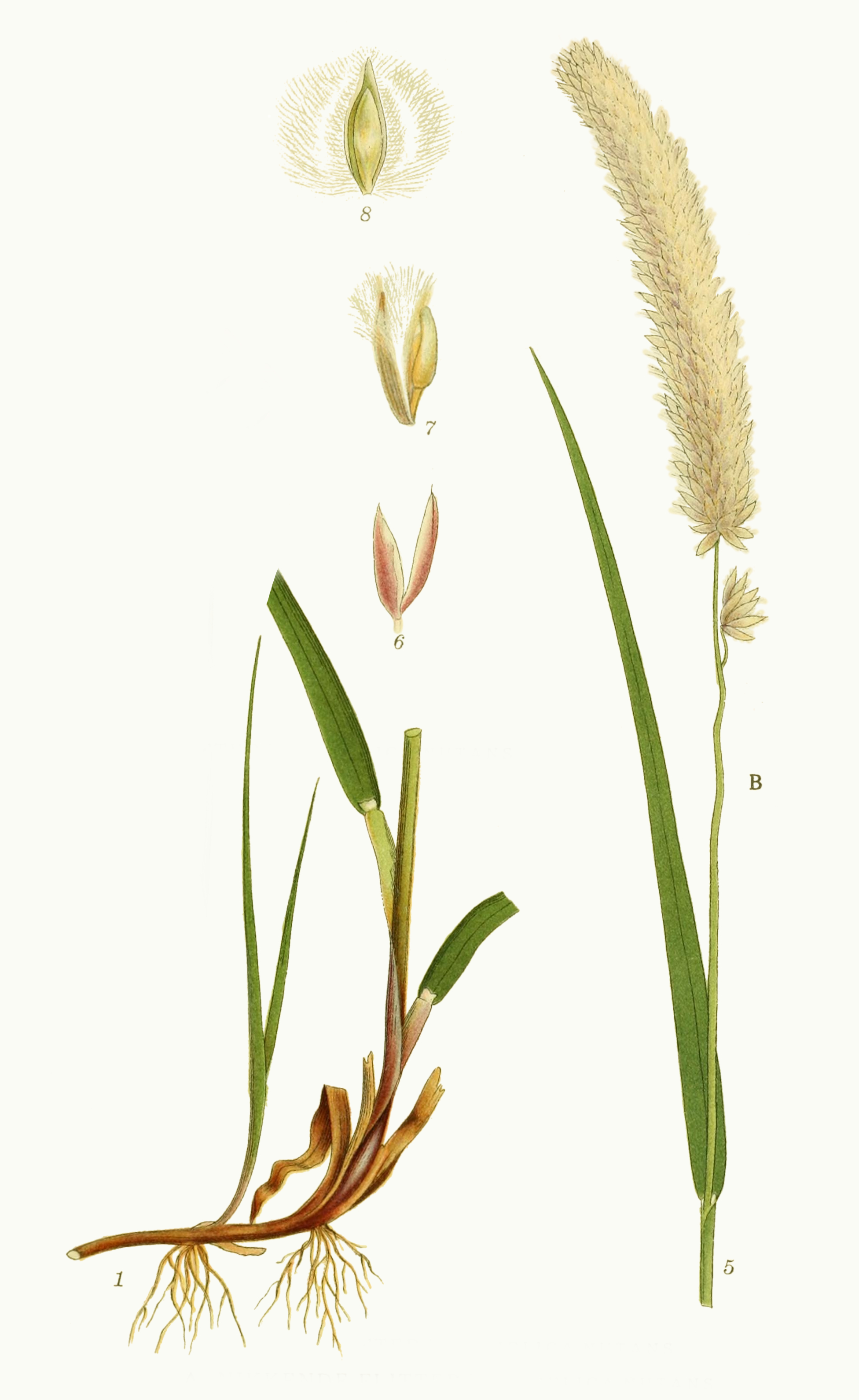 Mélique ciliée